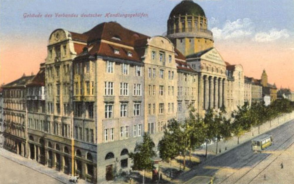 Das Gebäude des “Verbandes Deutscher Handlungsgehilfen” um 1920 in Leipzig, Zeitzer Straße (heute Karl-Liebknecht-Straße)